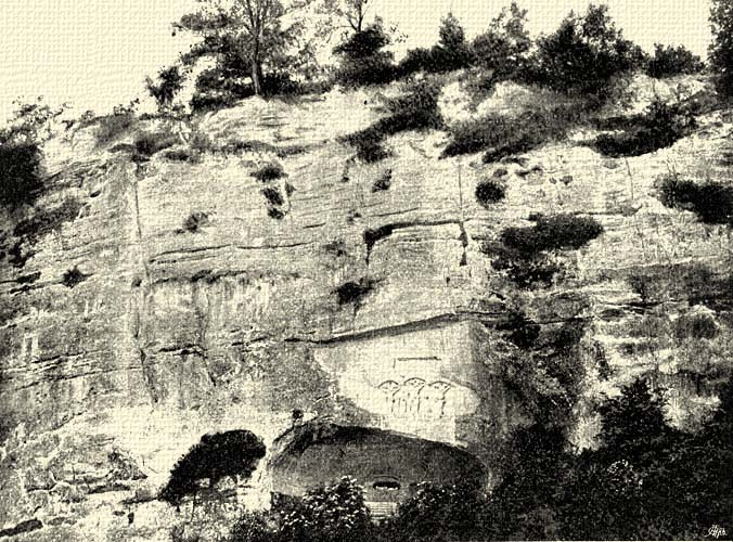 Az őrmezői sziklafalba faragott krisztuskép